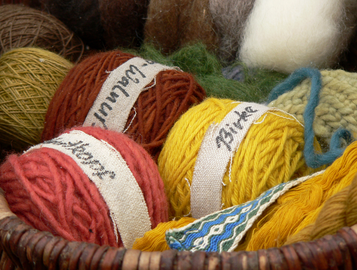 Wollknäuel naturgefärbt mit Birkenblätter, Walnuss und Blutblättriger Hautkopf